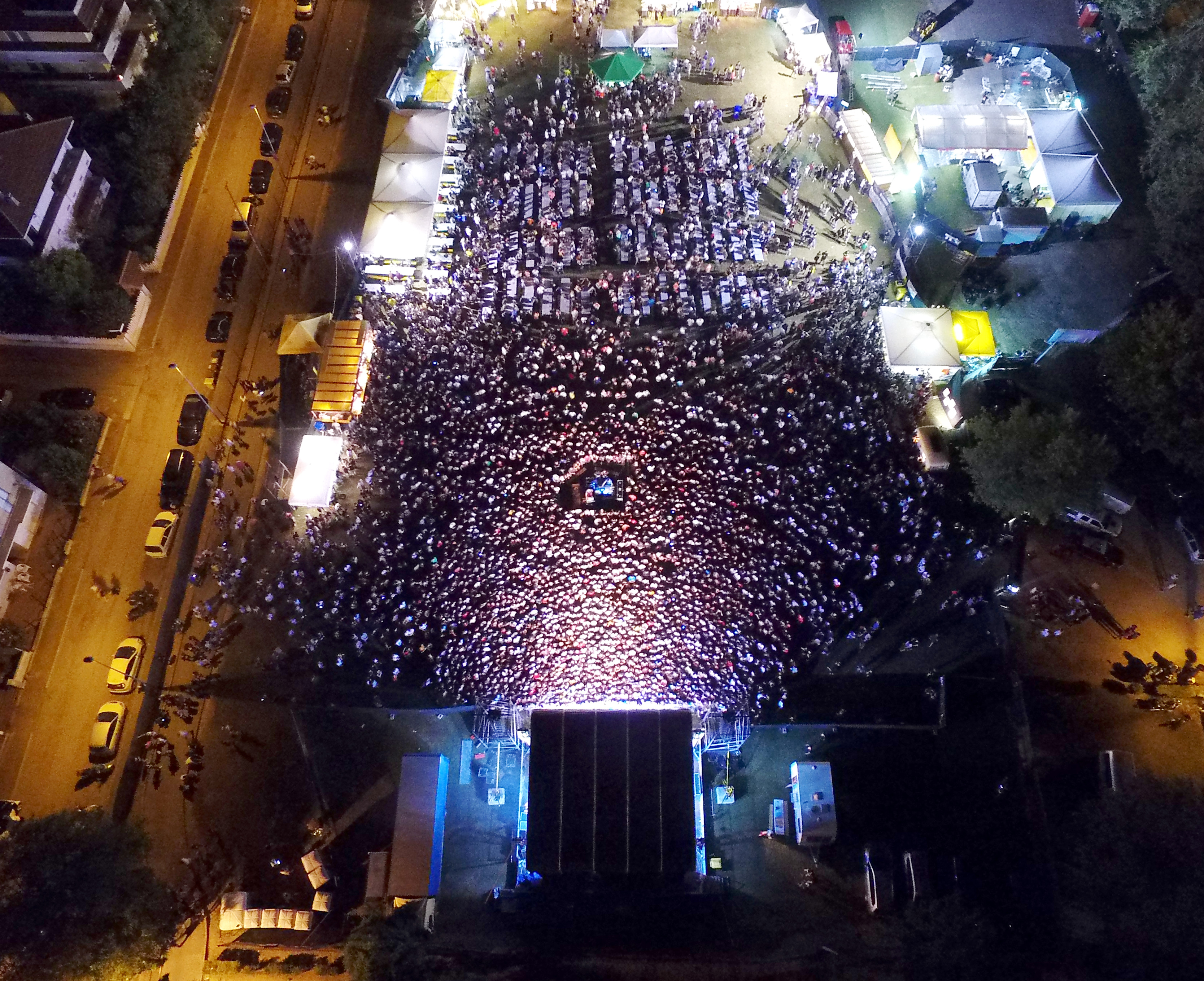 Veduta del MIND Festival dall'alto, edizione 2016